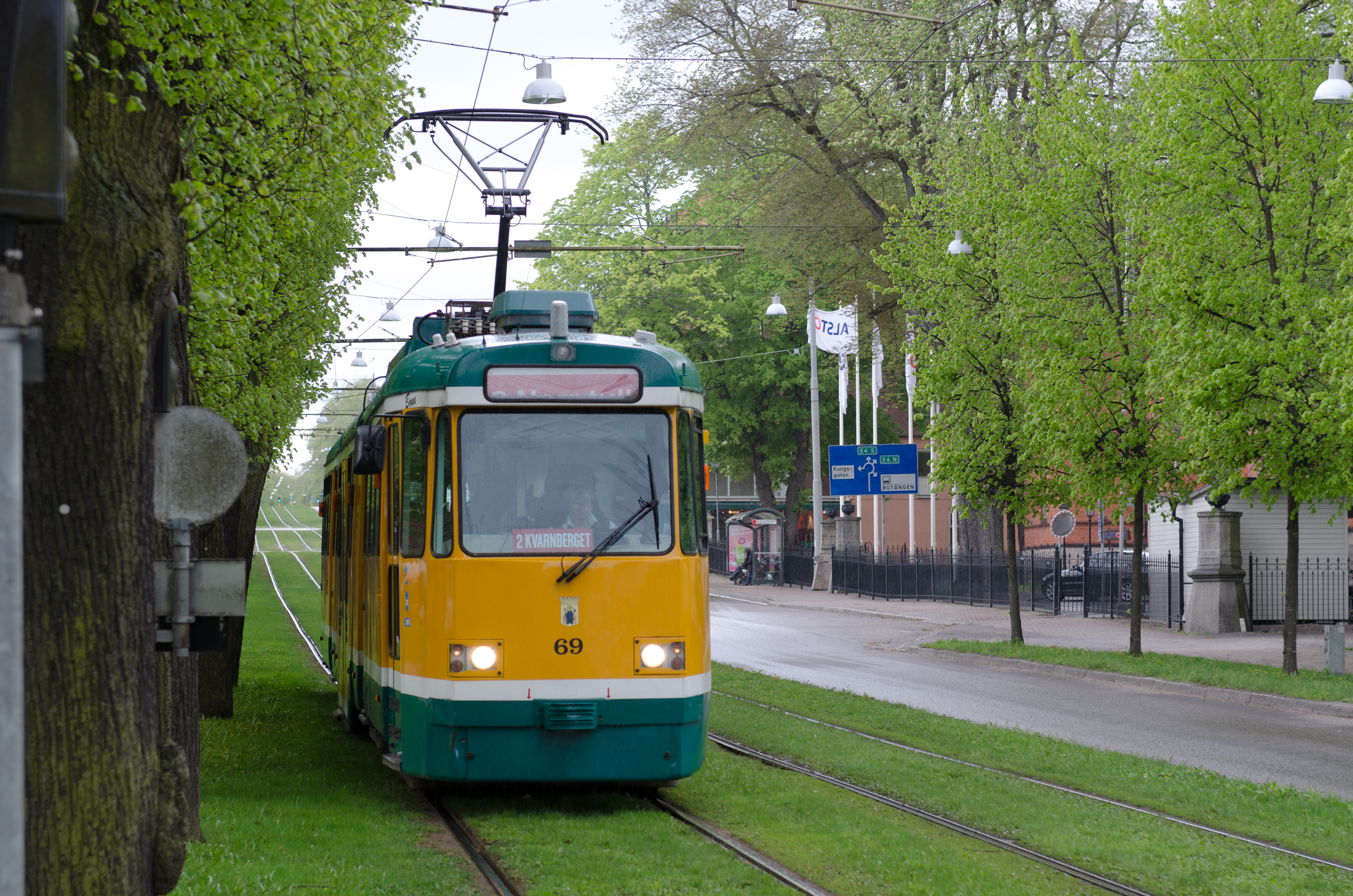 Tram at Norra Promenaden in Norrköping.